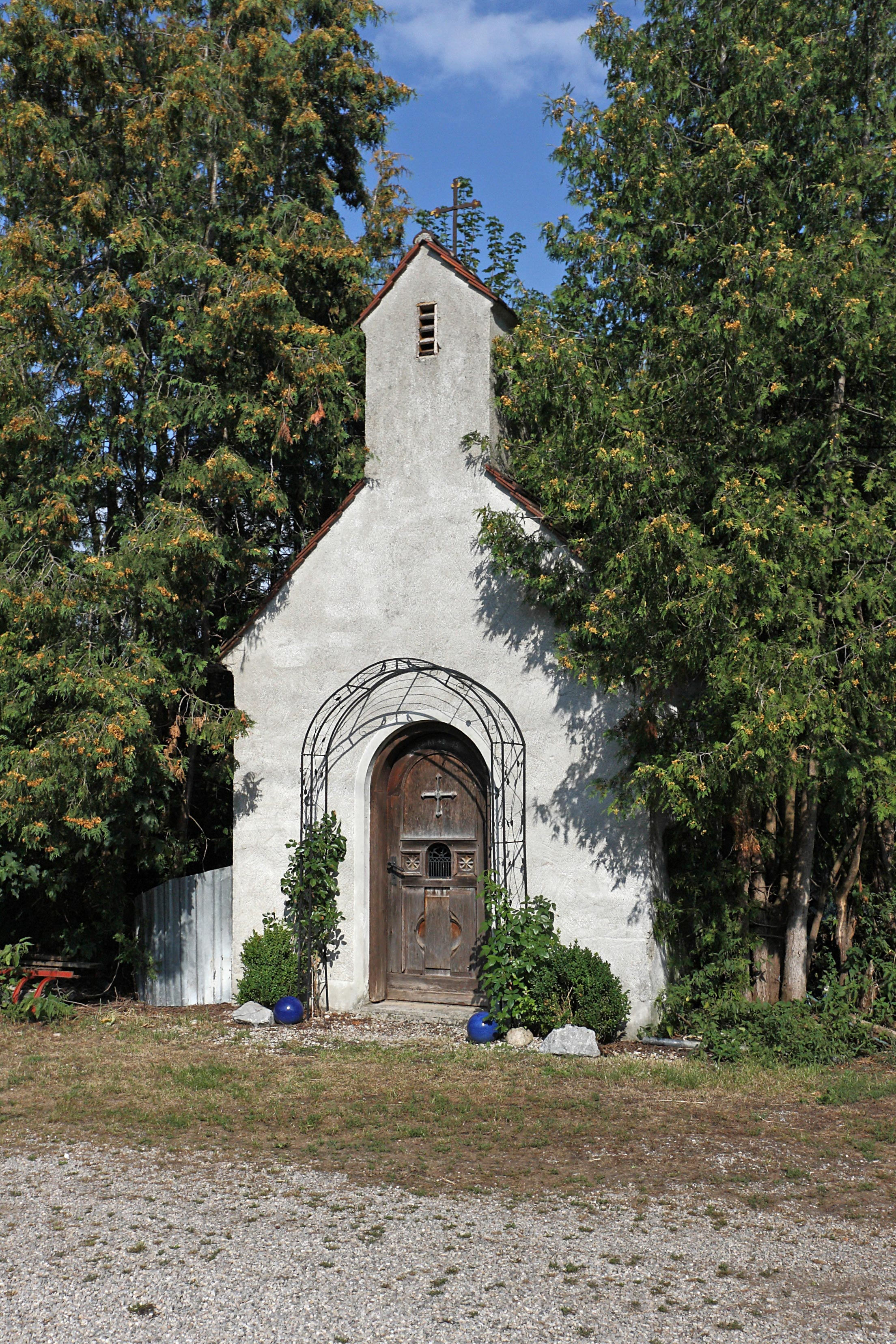 Westansicht der geosteten Kapelle im Hof des Anwesens